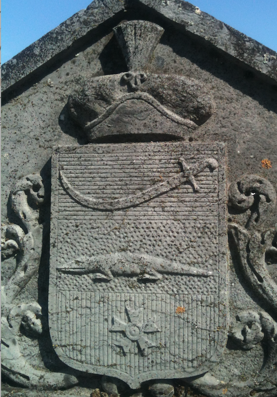 Montfalcon Jean - photographie du chapiteau blasonné Tombe Compesières - 2018-08-10 à 16.37.06